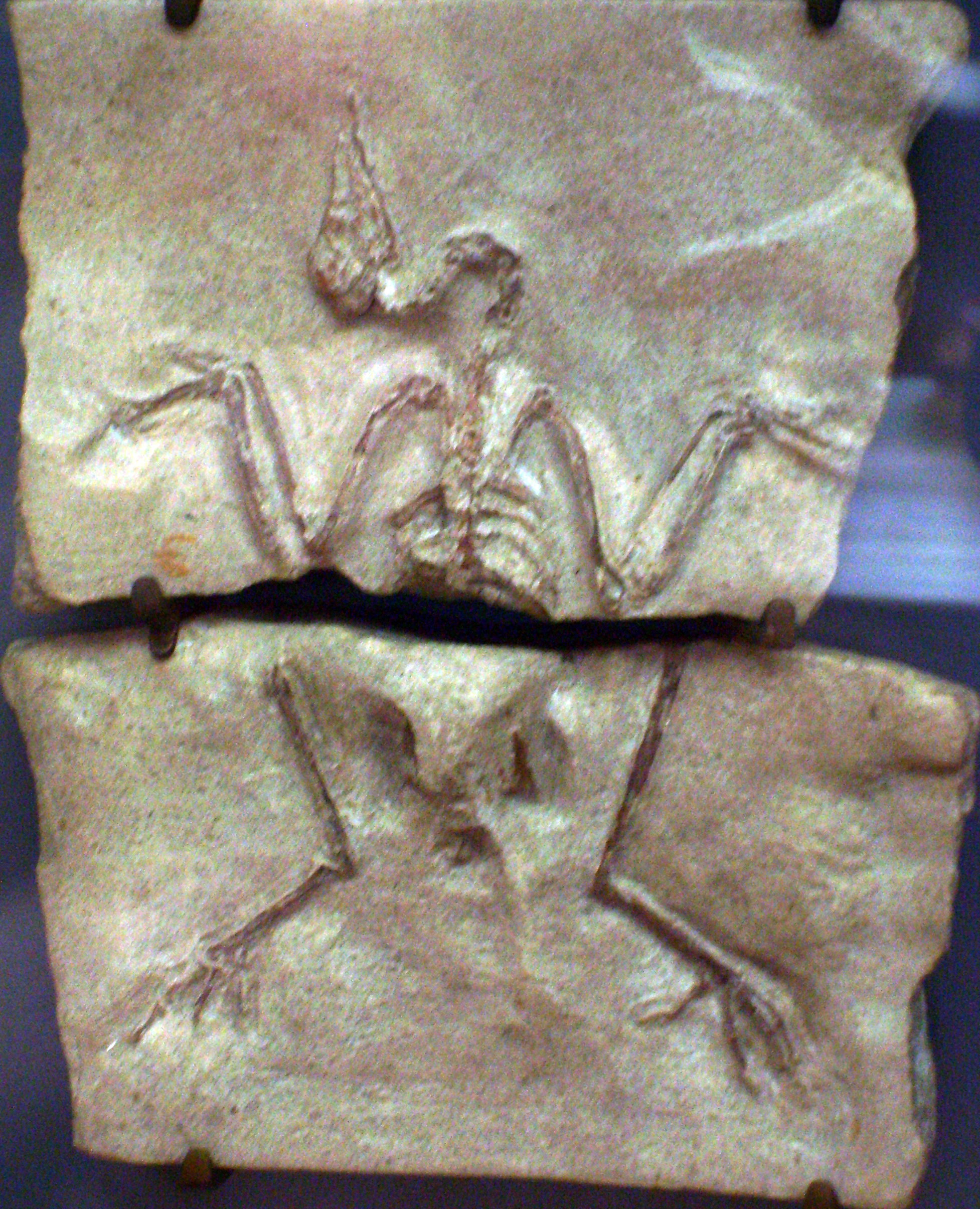 Palaeortyx species skeleton, Muséum national d'histoire naturelle, Paris.